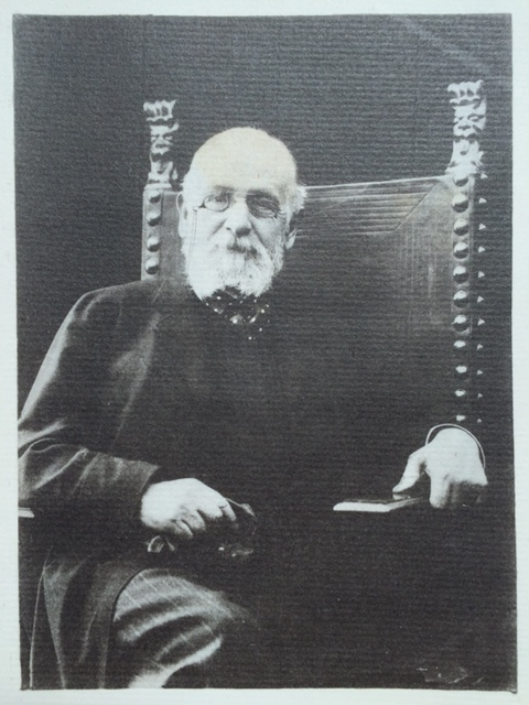 Jean Jules Guiffrey